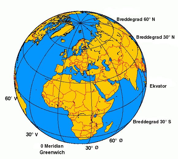 Jorden, med meridianer og breddegrader - Fra fransk Wiki, bearbeidet for NO.